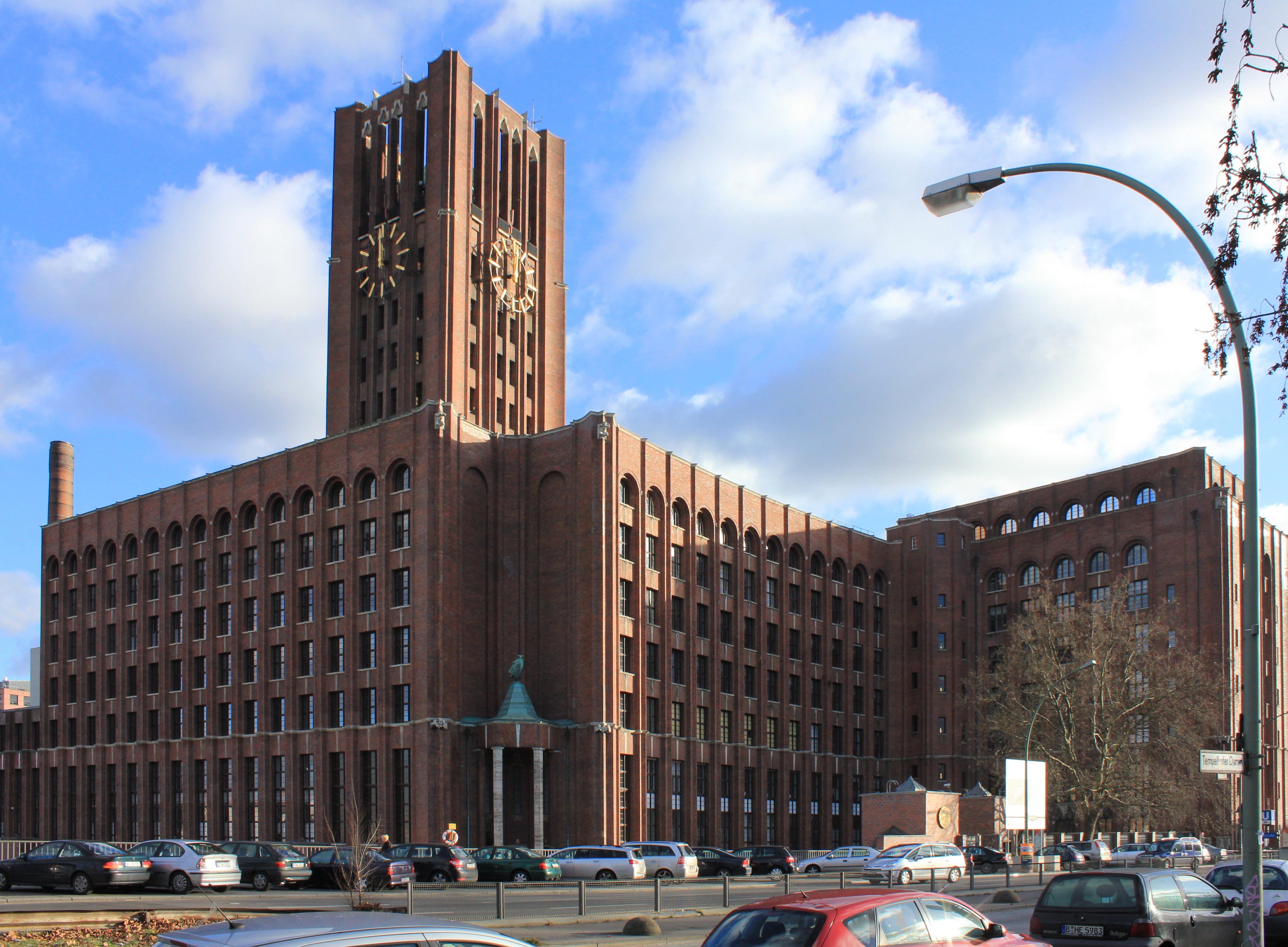 Ullstein-Druckhaus 1925-27 von Eugen Schmohl